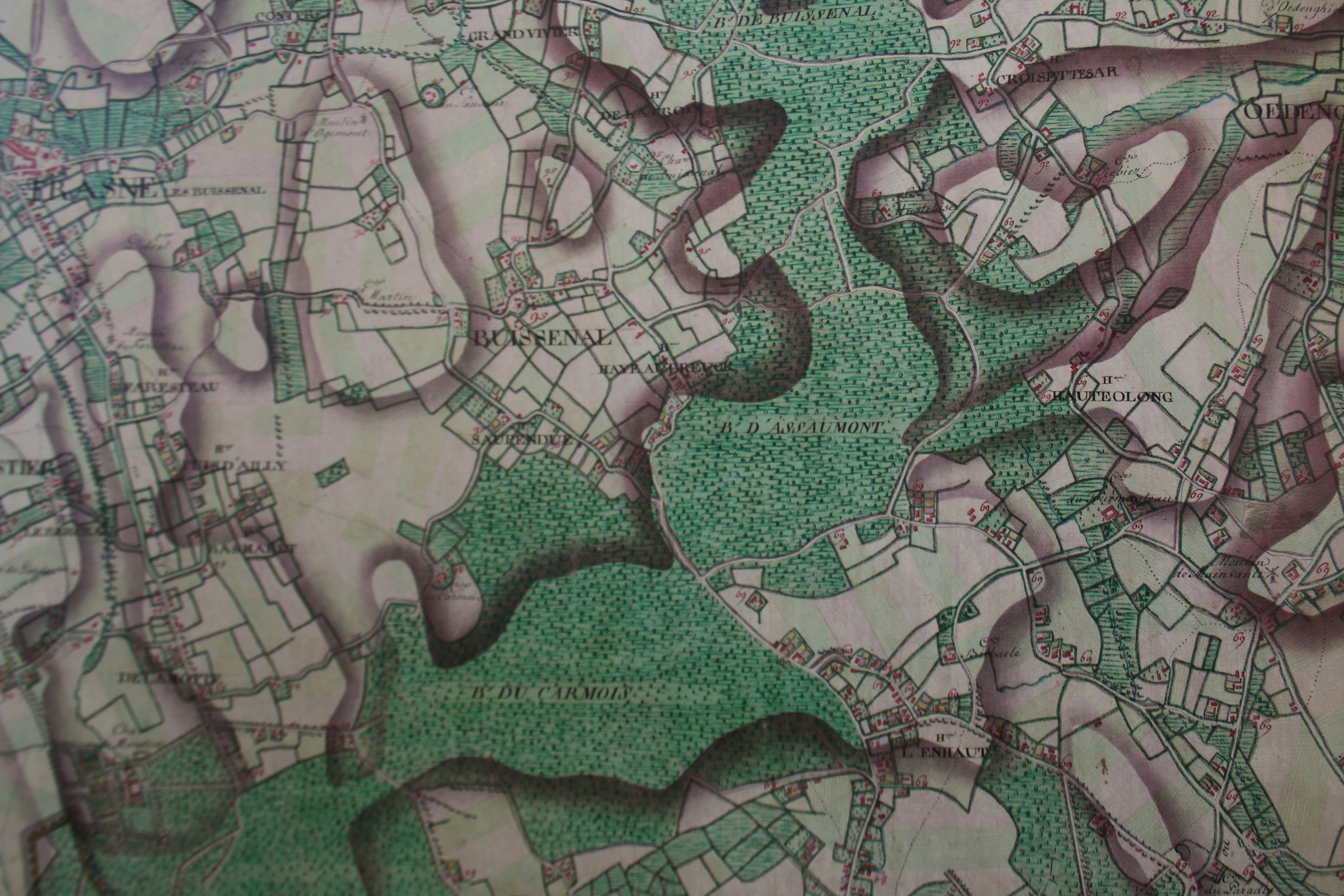 Bois d'Houtaing, Bois d'Assoumont, Bois du Carmois Bois à Choques Ferraris